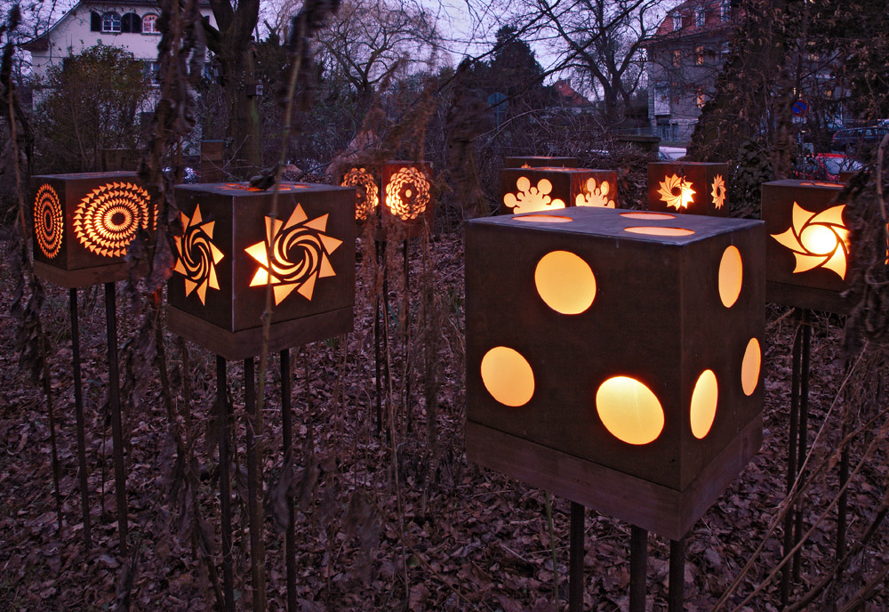 Vortex Garten Darmstadt